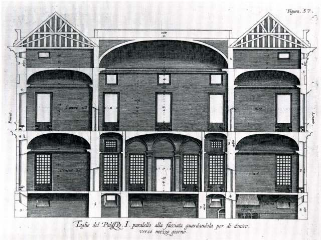 Palazzo te Genua, doorsnede. Afkomstig uit: Peter Paul Rubens (1622) Palazzi di Genova, Aversa: Rubens, fig. 57.